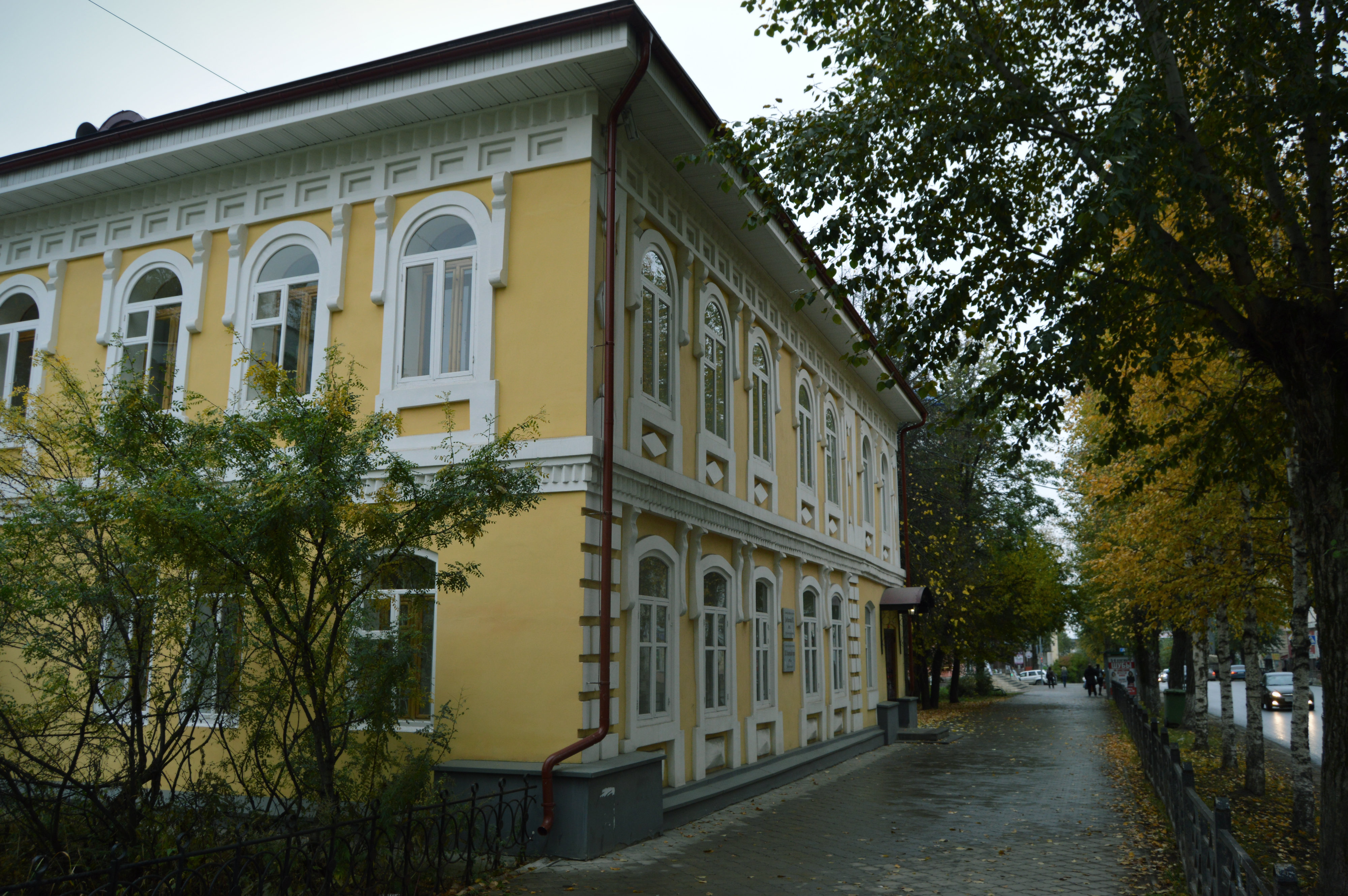 Дом купца оплеснина (Республика Коми, Сыктывкар, советская улица, 25)